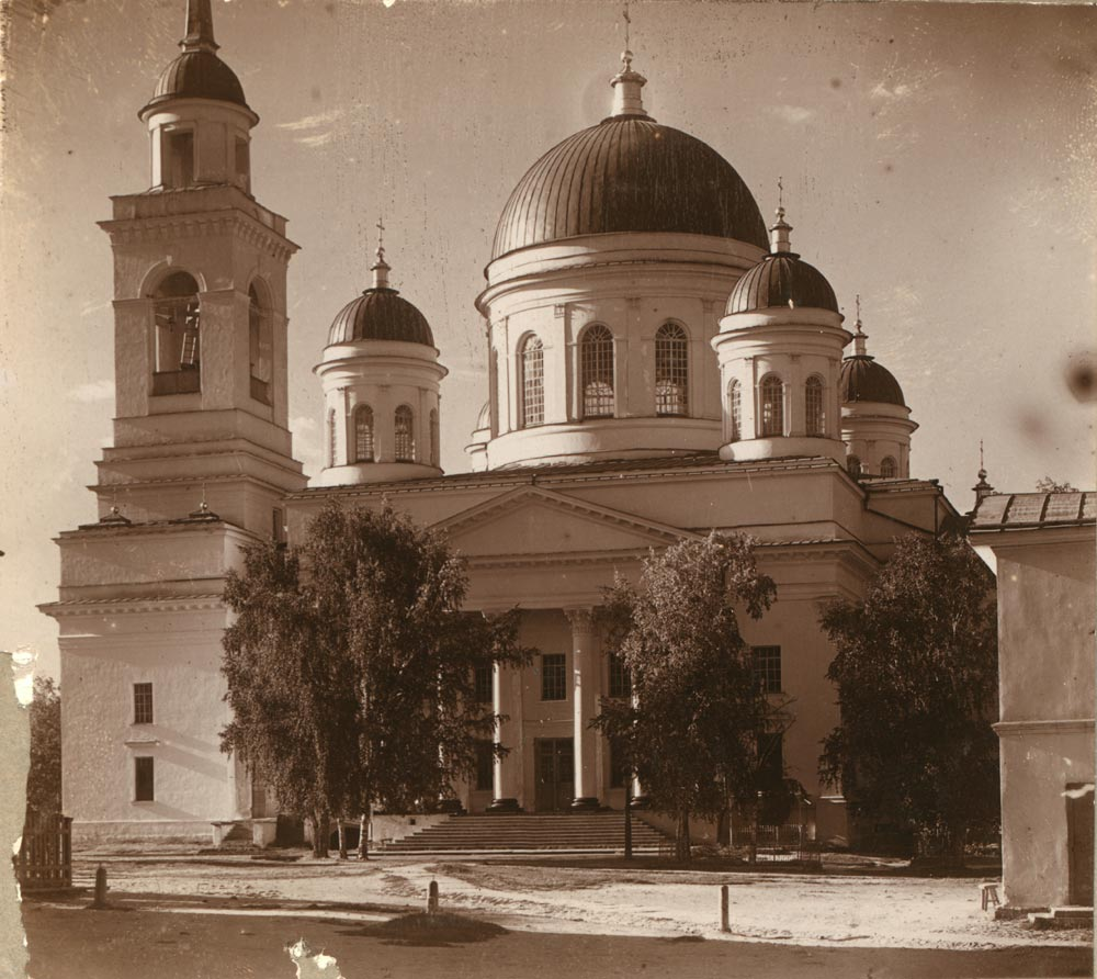 Собор Александра Невского в Ново-Тихвинском женском монастыре